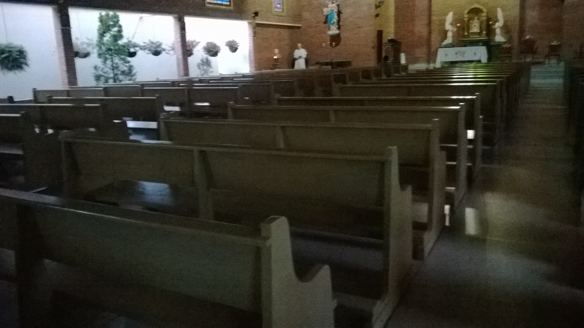 asamblea de la parroquia